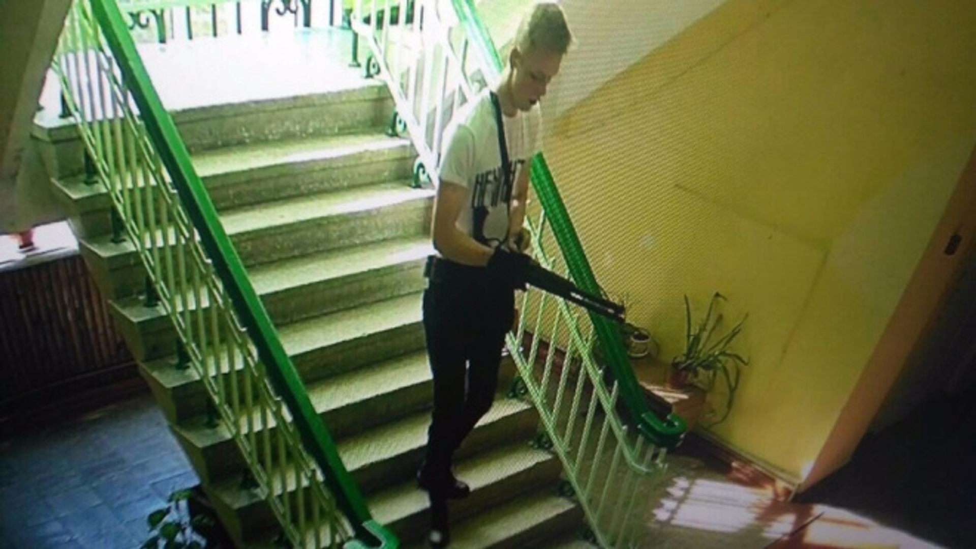 Стрелок в Керченском политехническом колледже